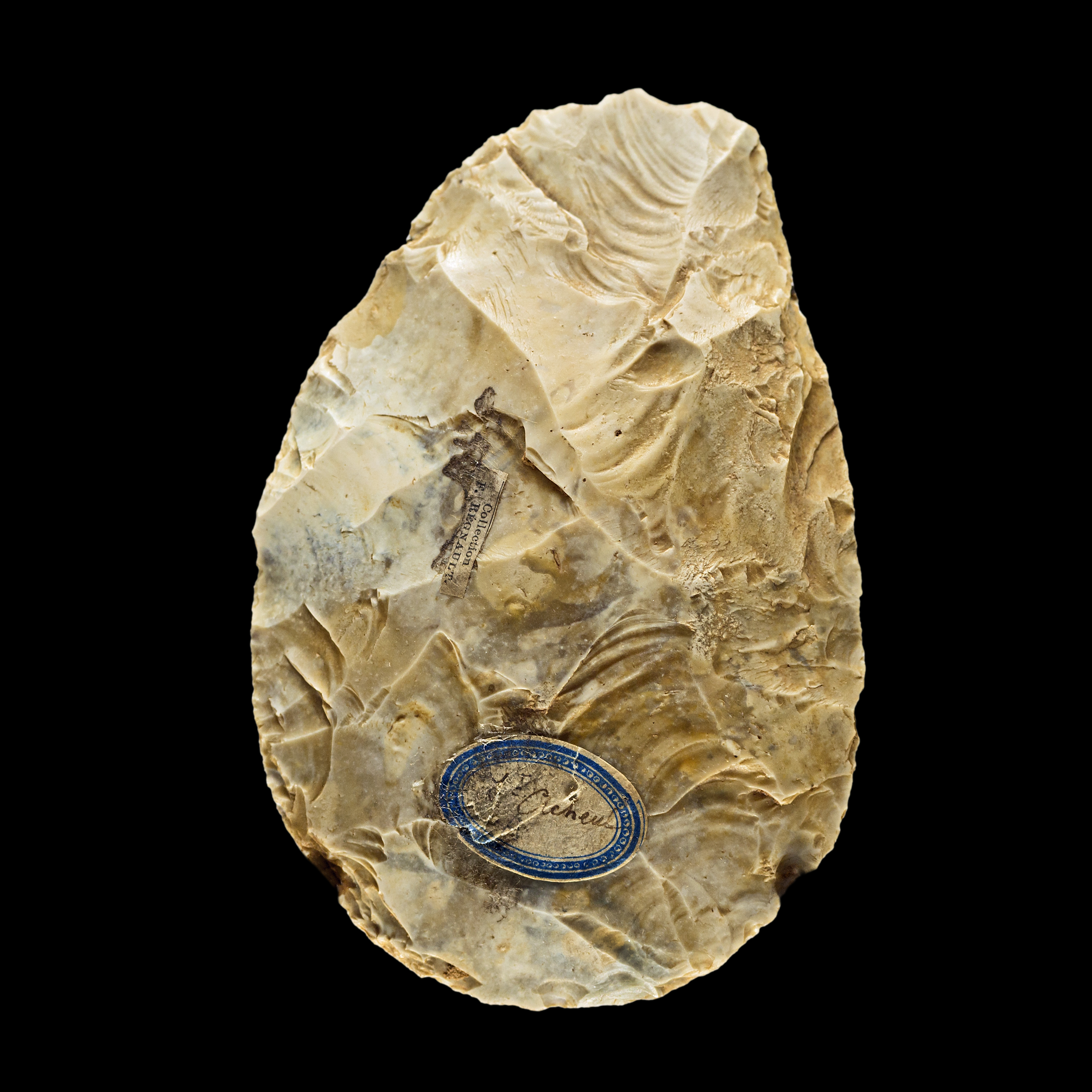 Biface